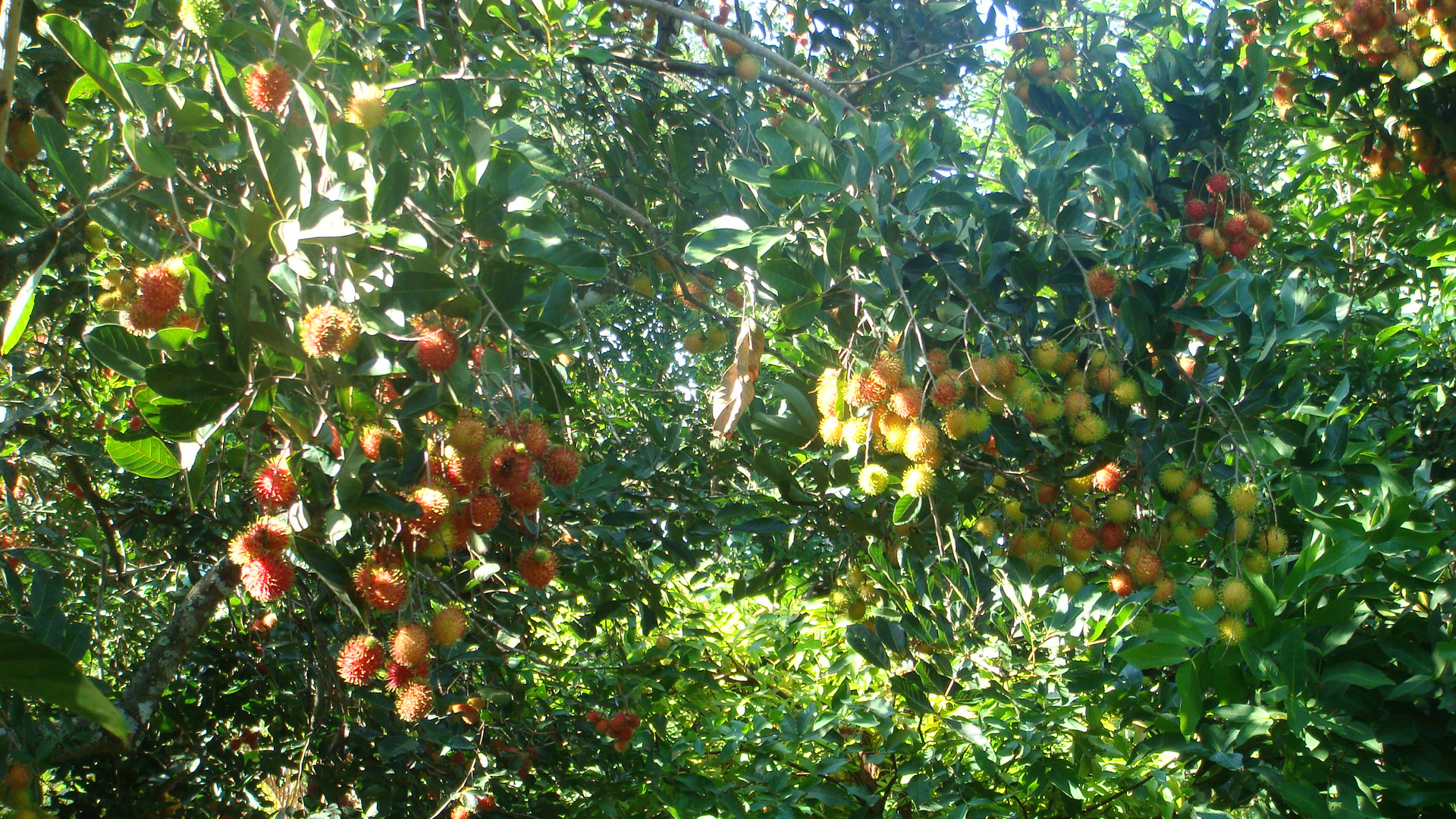 Chôm chôm nặng trĩu trái